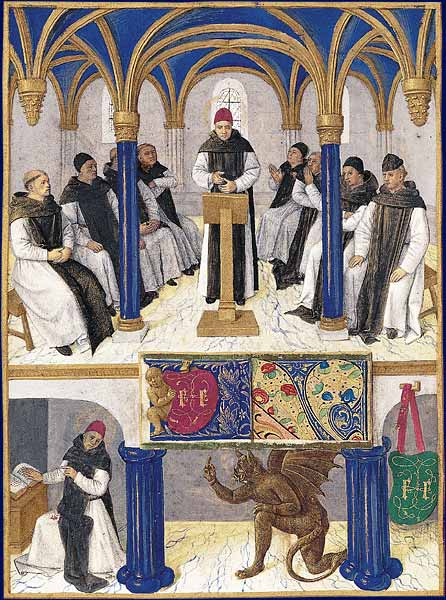 Saint Bernard Heures d'Étienne Chevalier, enluminées par Jean Fouquet Musée Condé, Chantilly, R.-G. Ojeda, RMN / musée Condé, Chantilly Dans la salle capitulaire, saint Bernard s'adresse à ses frères. Les expressions et attitudes corporelles des huit moines qui l'écoutent sont des plus variées. Nul n'entend ni ne contemple les mots de cet éloquent prêcheur de la même manière. Le geste d'énumération de saint Bernard fait sans doute référence à l'épisode évoqué en dessous. Le diable, vaincu par la ténacité de saint Bernard, lui révèle enfin les sept vers du Psautier, dont la simple récitation quotidienne assure le salut de l'homme.